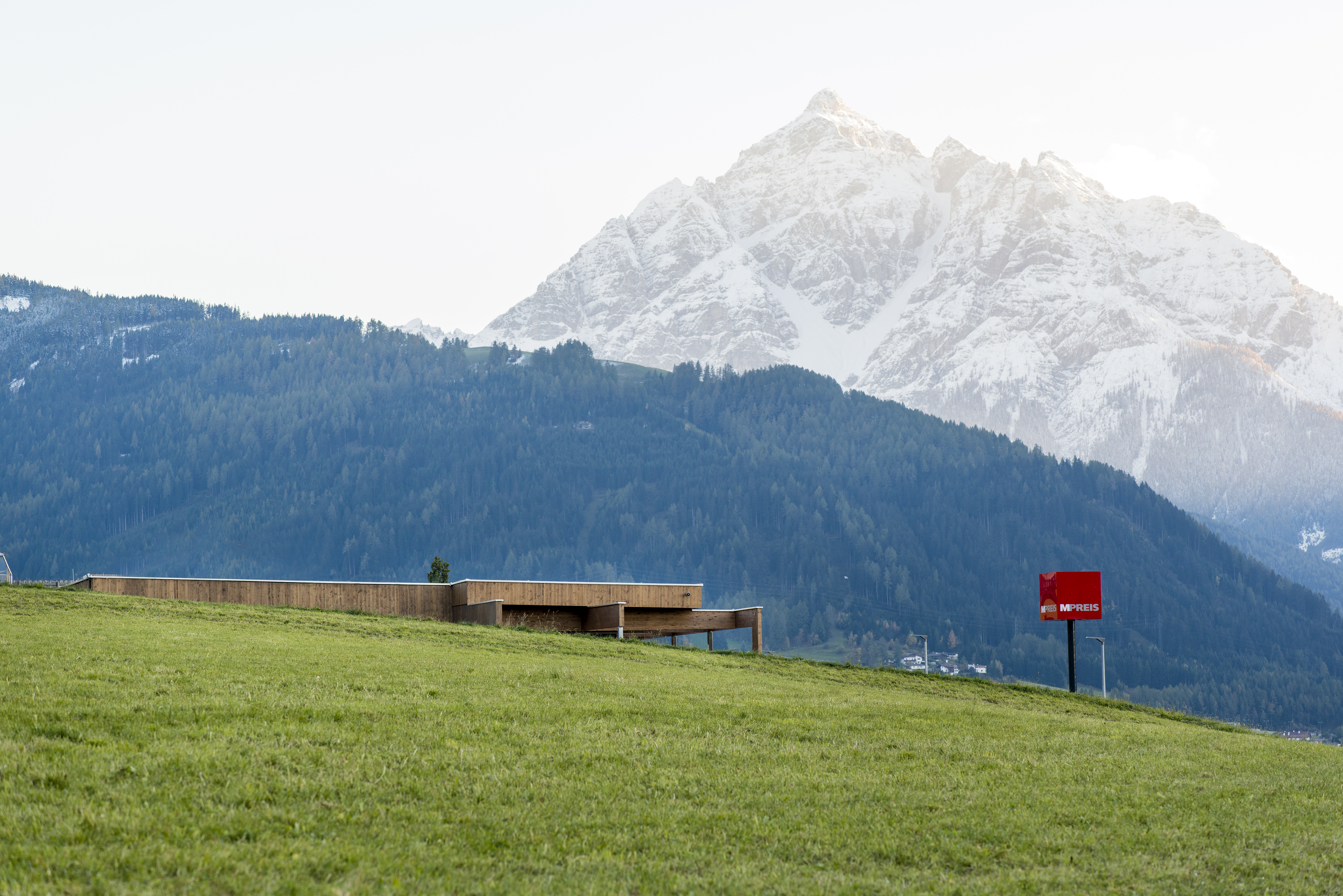 Der MPREIS Markt in Patsch wurde von Architekt Volker Miklautz geplant. Im Hintergrund ist das Bergpanorama der Serles zu sehen.